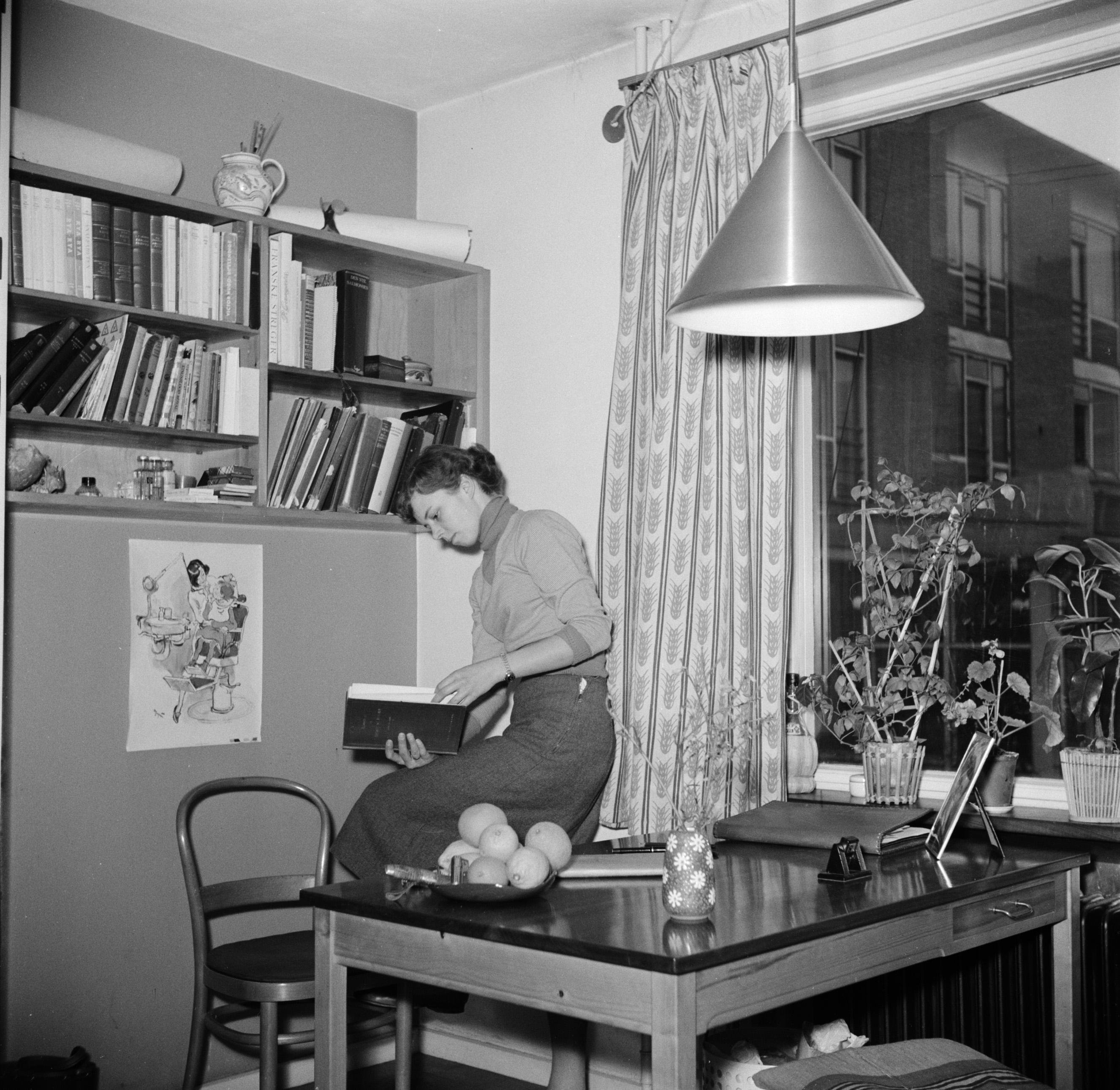 Collectie / Archief : Fotocollectie Van de Poll Reportage / Serie : Het 4 mei studentenhuis Beschrijving : Studente met een boek in een kamer in het studentenhuis Annotatie : Het studentenhuis is gebouwd met steun uit het Fonds van de Vrijheid en alleen toegankelijk voor (klein)kinderen van vrijheidsstrijders uit de tweede wereldoorlog Datum : maart 1954 Locatie : Denemarken, Frederiksberg Trefwoorden : boeken, dagelijks leven, huisraad, interieurs, kamerverhuur, meubilair, studenten, studentenhuisvesting Fotograaf : Poll, Willem van de, [onbekend] Auteursrechthebbende : Nationaal Archief Materiaalsoort : Negatief (zwart/wit) Nummer archiefinventaris : bekijk toegang 2.24.14.02 Bestanddeelnummer : 252-8924